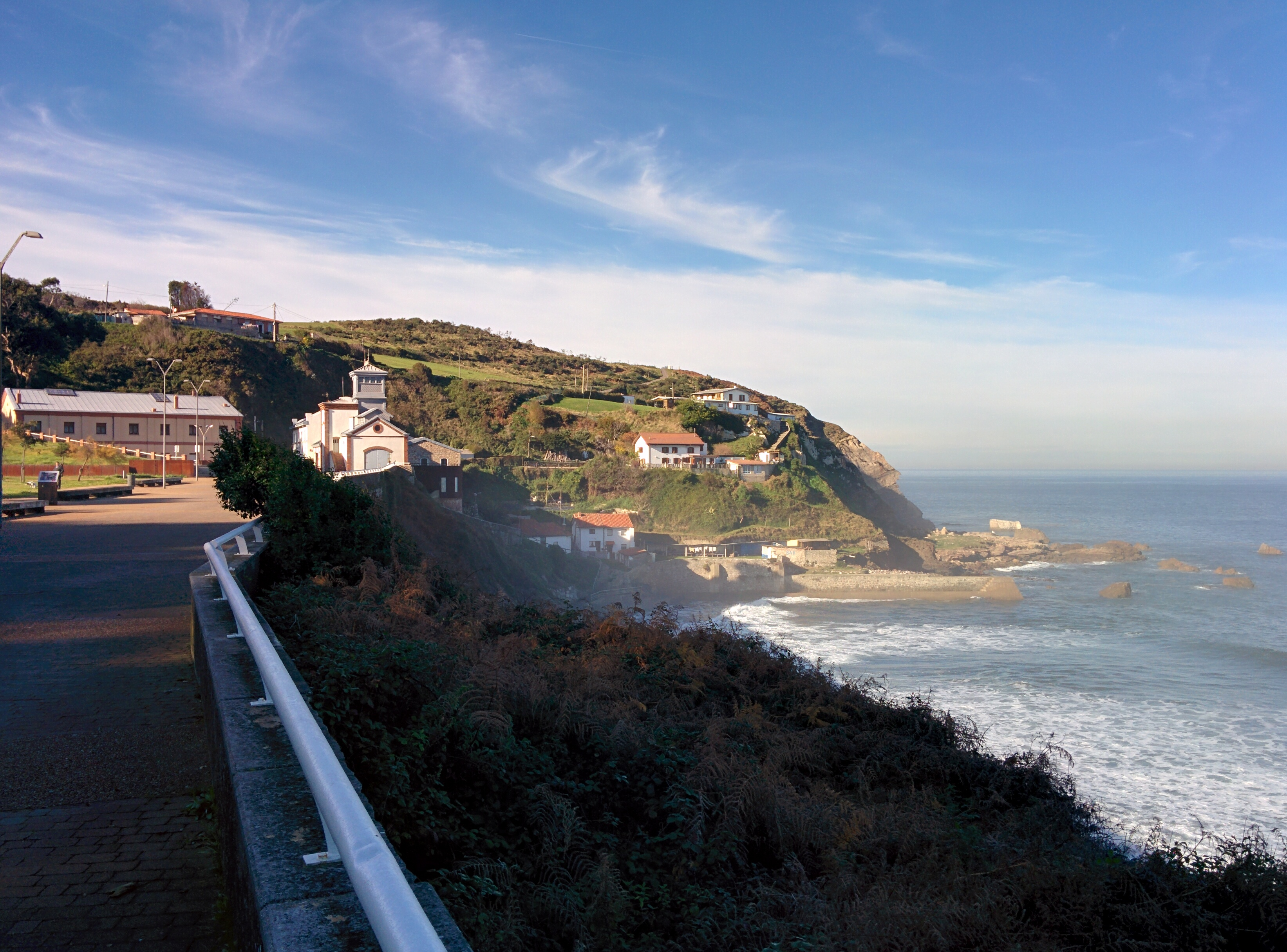 Vista costera junto al castillete de la mina de Arnao (Castrillón, Asturias, España).